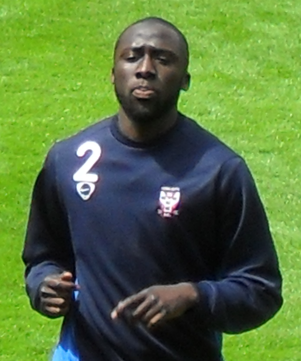 Djoumin Sangare